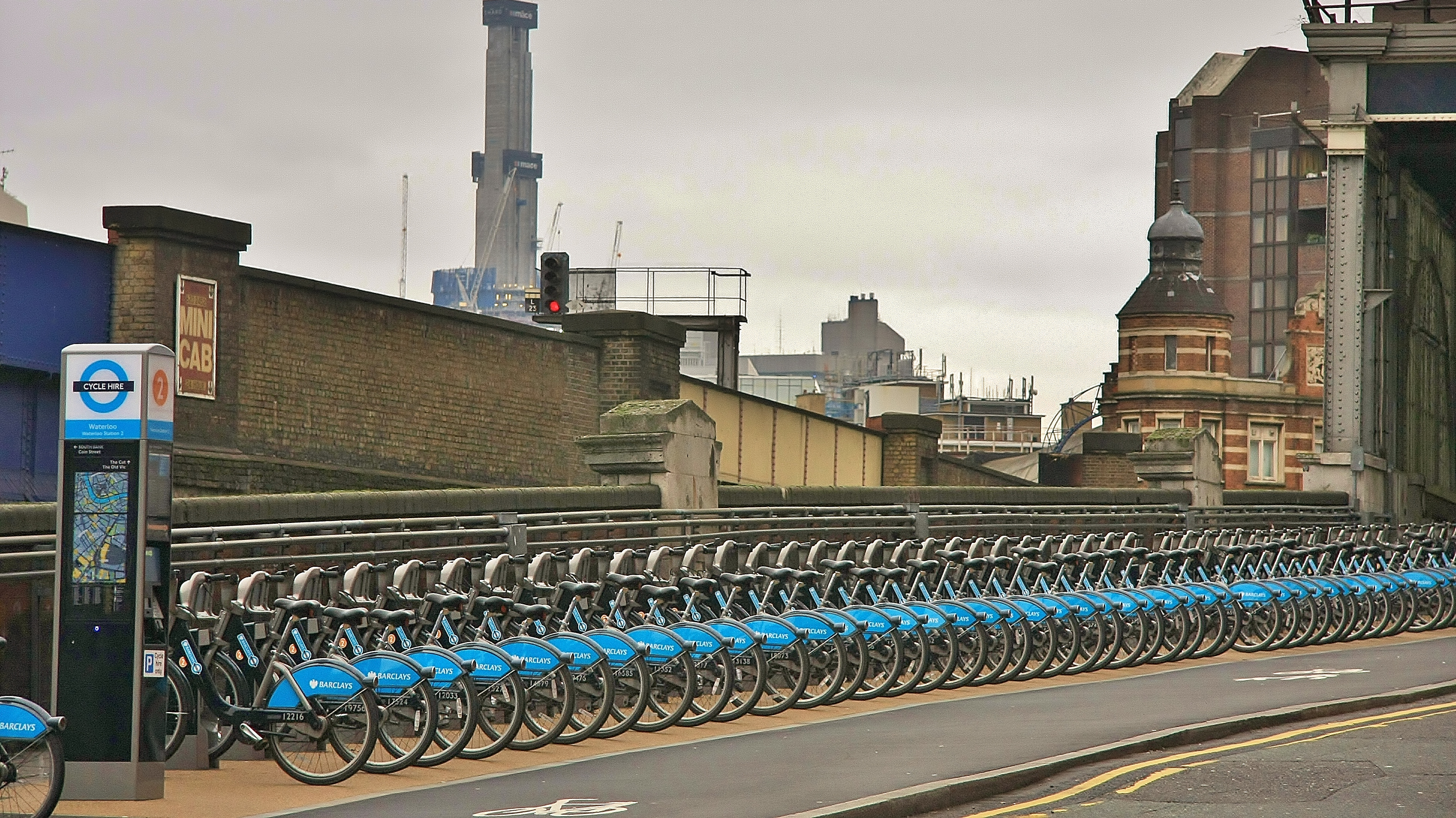 Boris' Bikes